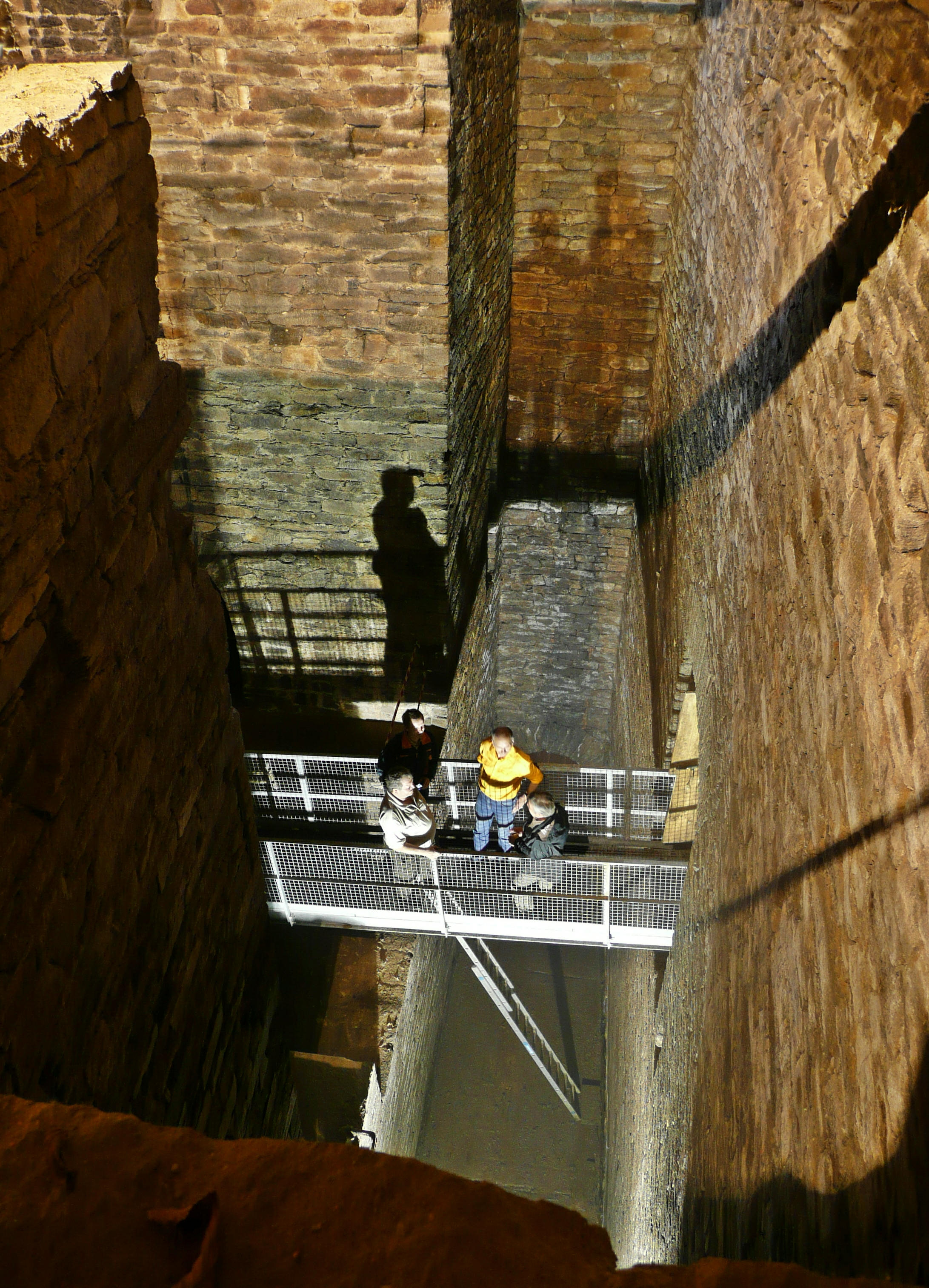 Das Bild zeigt eine der beiden Radstubenkammern in der Radstubenkaue vom IV.Lichtloch des Rothschönberger Stollns in Reinsberg. In der Stube befand sich ein Kehrrad mit einem Durchmesser von 11,9 Metern und einer Breite von 1,6 Metern. In der benachbarten Radstube befand sich ein gleich großes und halb so breites Kunstrad.